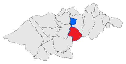 Mapa de l'antiga comuna de Montalbà dels Banys, feta a partir d'un mapa de lliure disposició